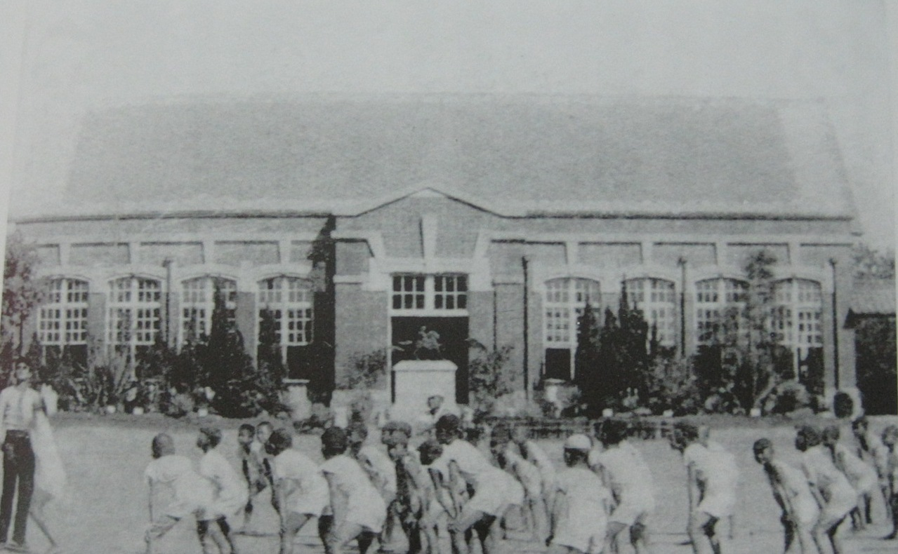 臺中村上公學校校園